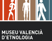 Logotip del Museu Valencià d'Etnologia